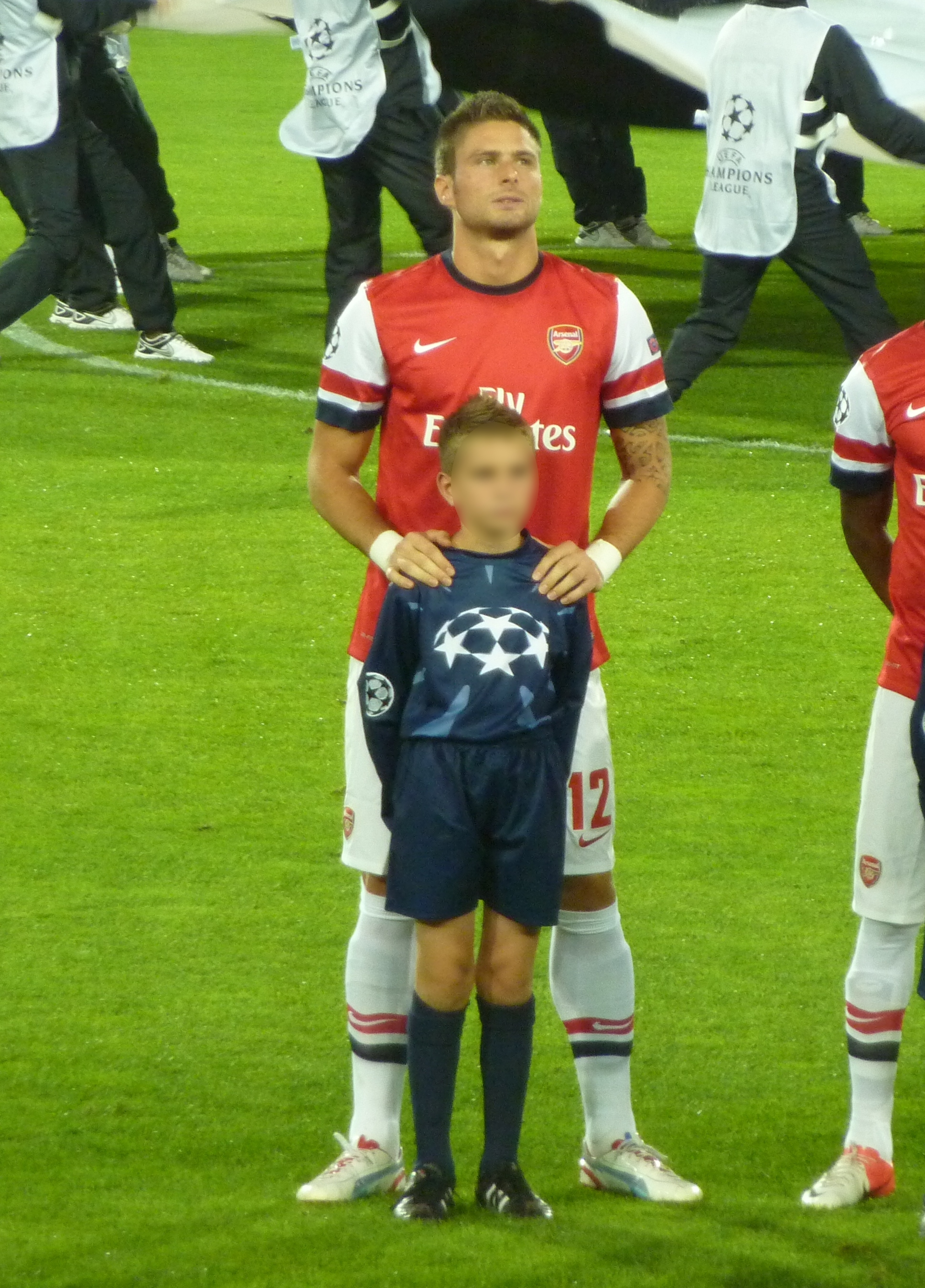 Olivier Giroud lors du match MHSC - Arsenal (Ligue des Champions, Phase de poules, 1er match, 18/09/2012)